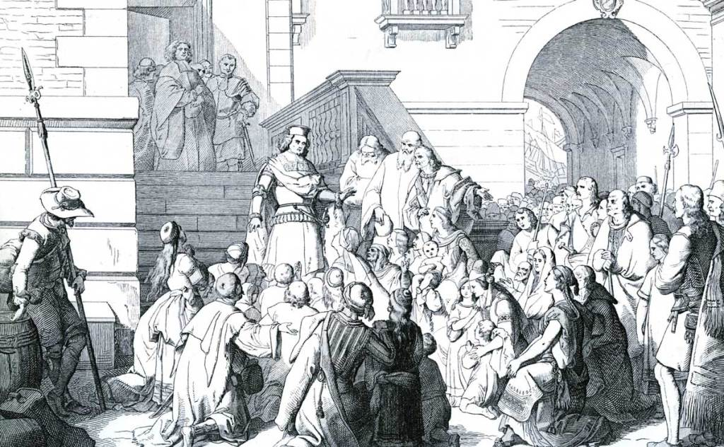 STORIA VENETA – 129: 1669 – DOPO 22 ANNI DI ASSEDIO CANDIA SI ARRENDE. VENEZIA ABBANDONA CANDIA “Spettacolo miserando offriva Candia, sembrando piuttosto un sepolcro composto da vaste ruine, che una città che resistè allo sforzo di tanta gente pel corso di quasi tre anni. Gli abitanti ridotti a soli 4.000 d’ogni età e di ogni sesso, il dì 26 settembre assegnato alla partenza, recaronsi smunti e domati da tanti travagli al capitan generale Francesco Morosini, pregandolo ad una voce: volere esso tradurli in altro luogo non riconoscendo più la patria loro squallida e deformata, e quel che era peggiore caduta in mano a’ i nemici di Cristo”.